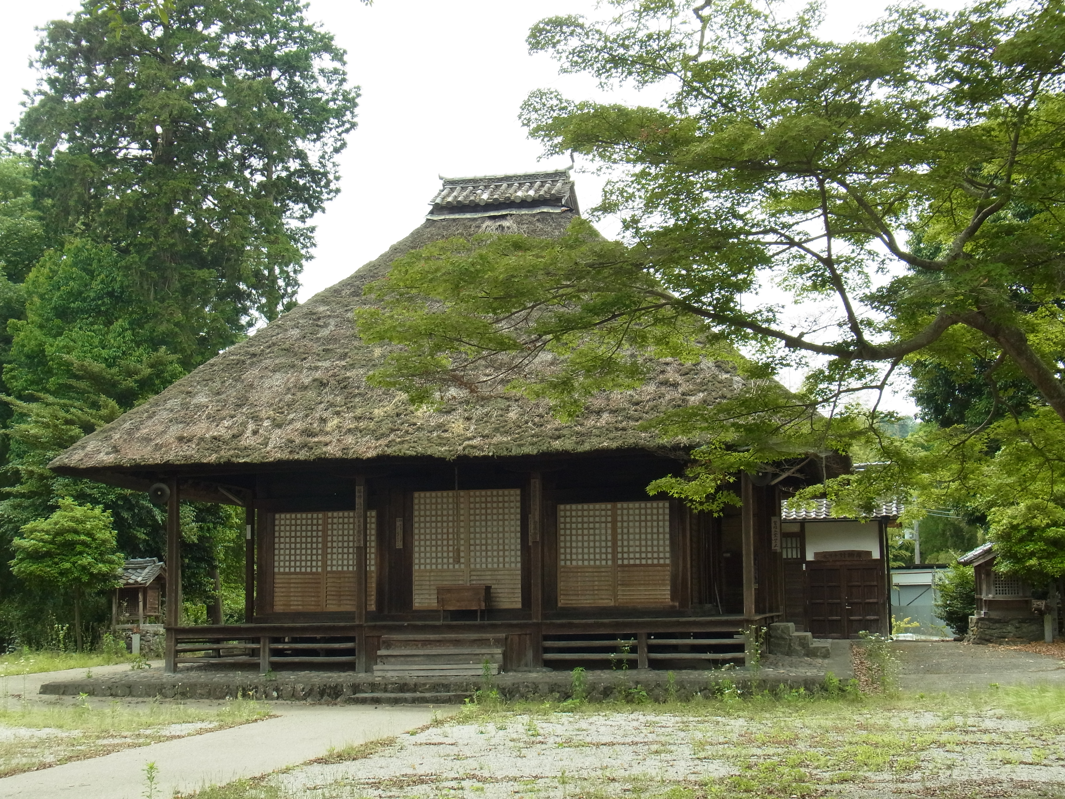 念佛寺 五條市大津町 2012.6.12